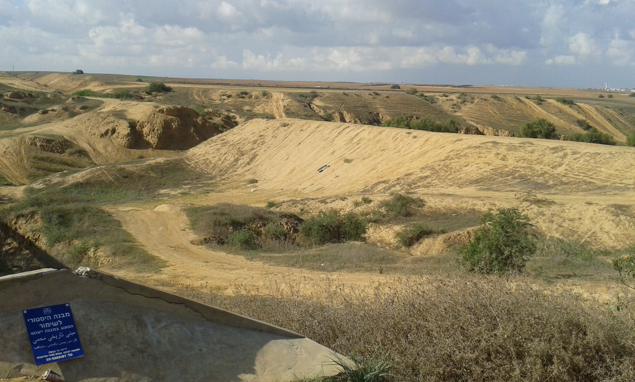 גשר הרכבת לייד אופקים בפארק שקד - הסוללה הזמנית